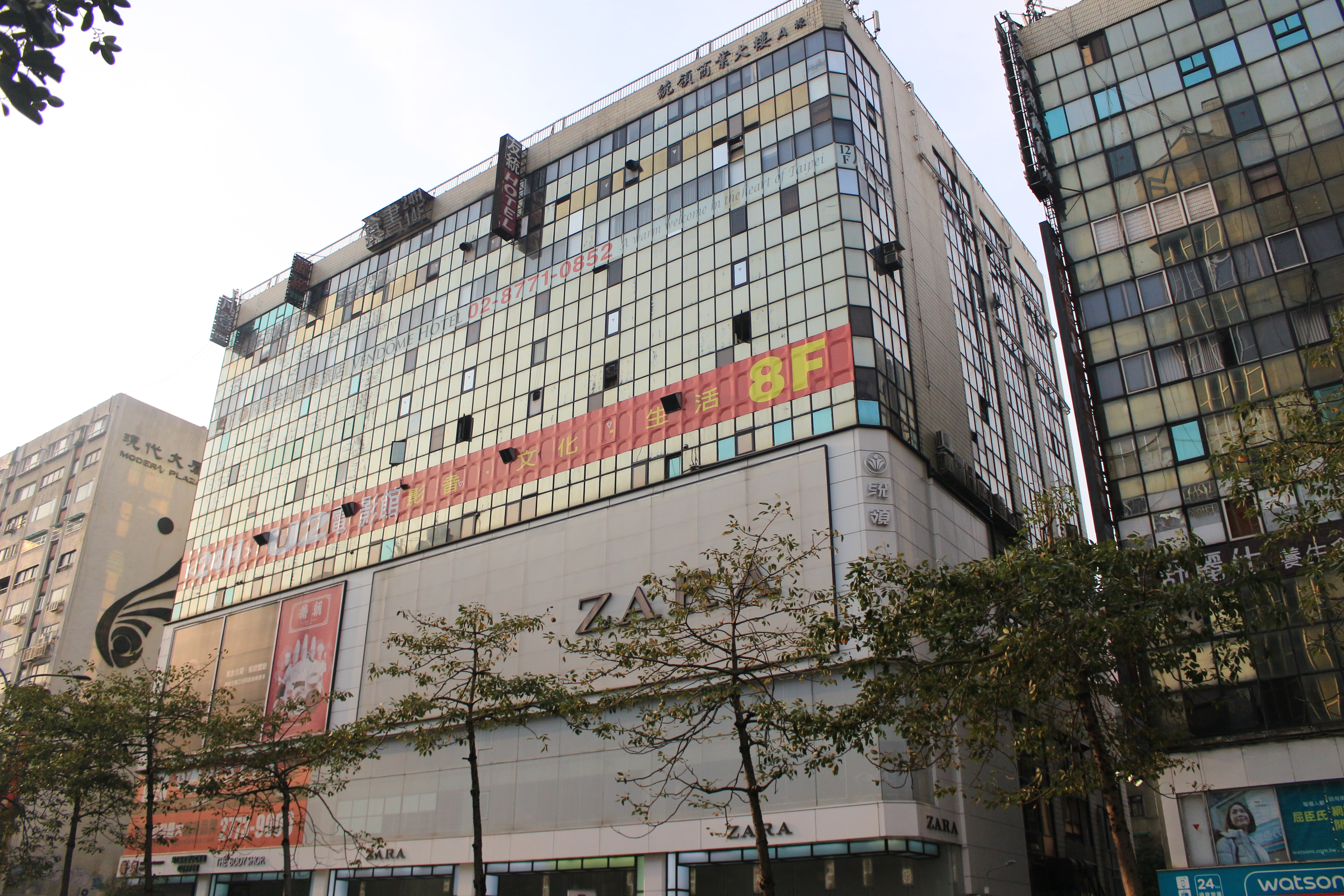 統領商業大樓A棟，原統領百貨台北店、同領育樂廣場，位於臺北市大安區忠孝東路四段201號。